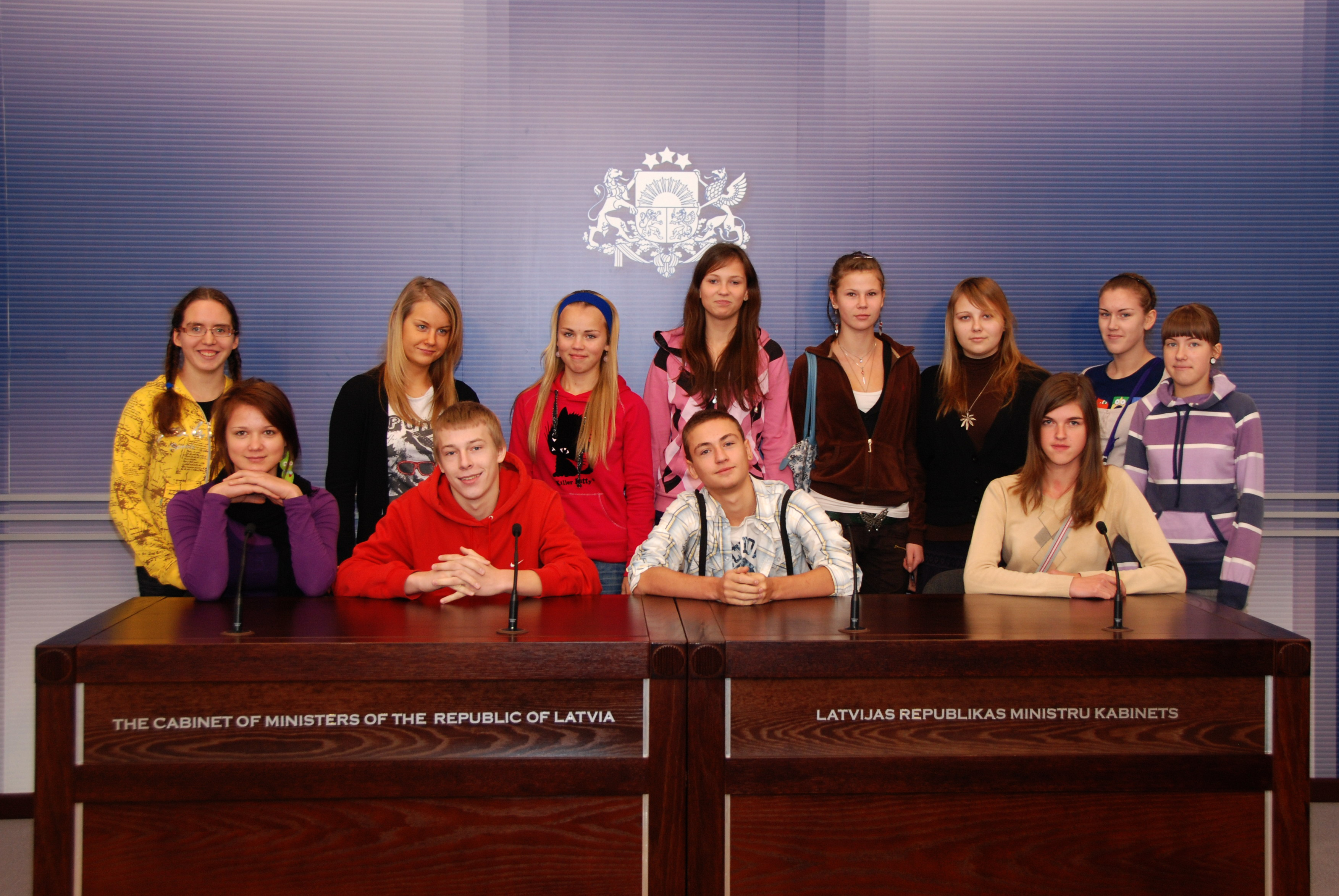 Salacgrīvas vidusskolas 9.klašu skolēni Ministru kabineta preses konferenču telpā Foto:Aivis Freidenfelds, Valsts kanceleja